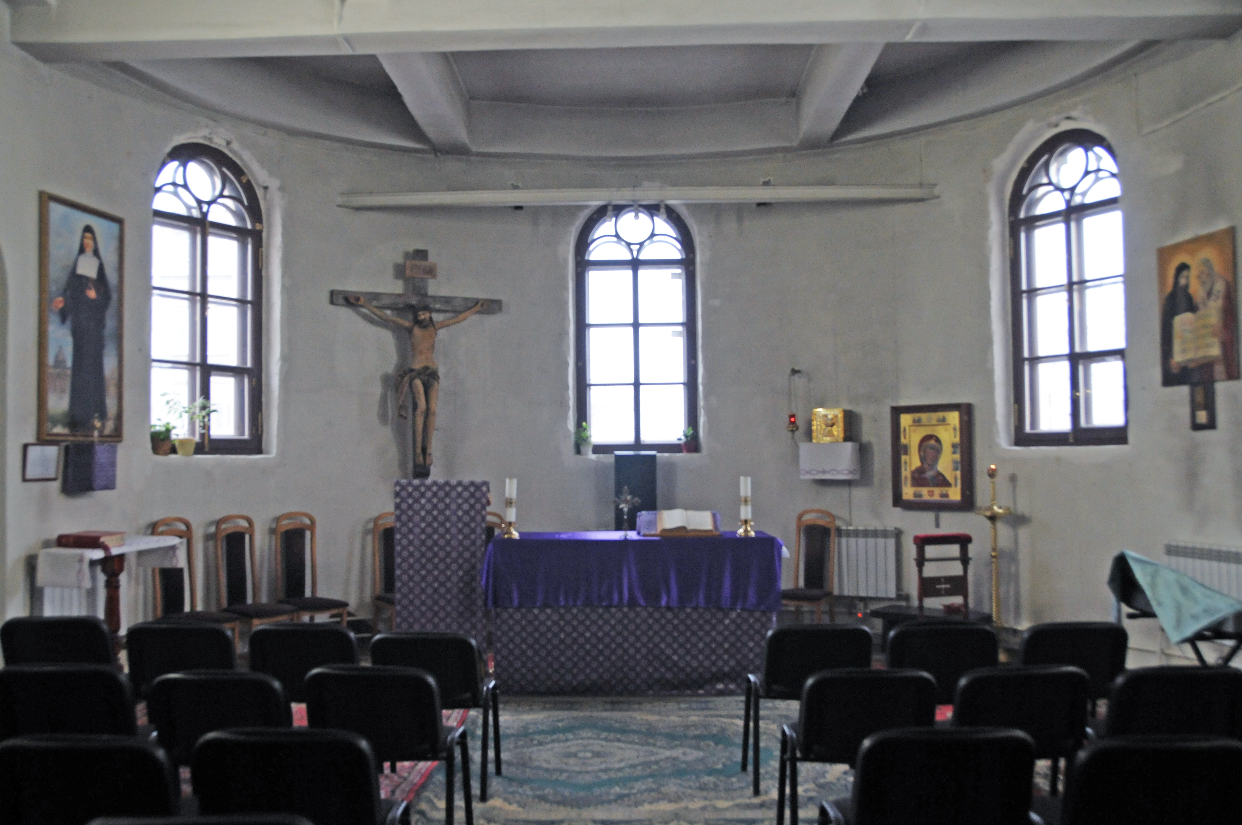 Часовня Храма Посещения Пресвятой Девой Марией Елизаветы (Санкт-Петербург)